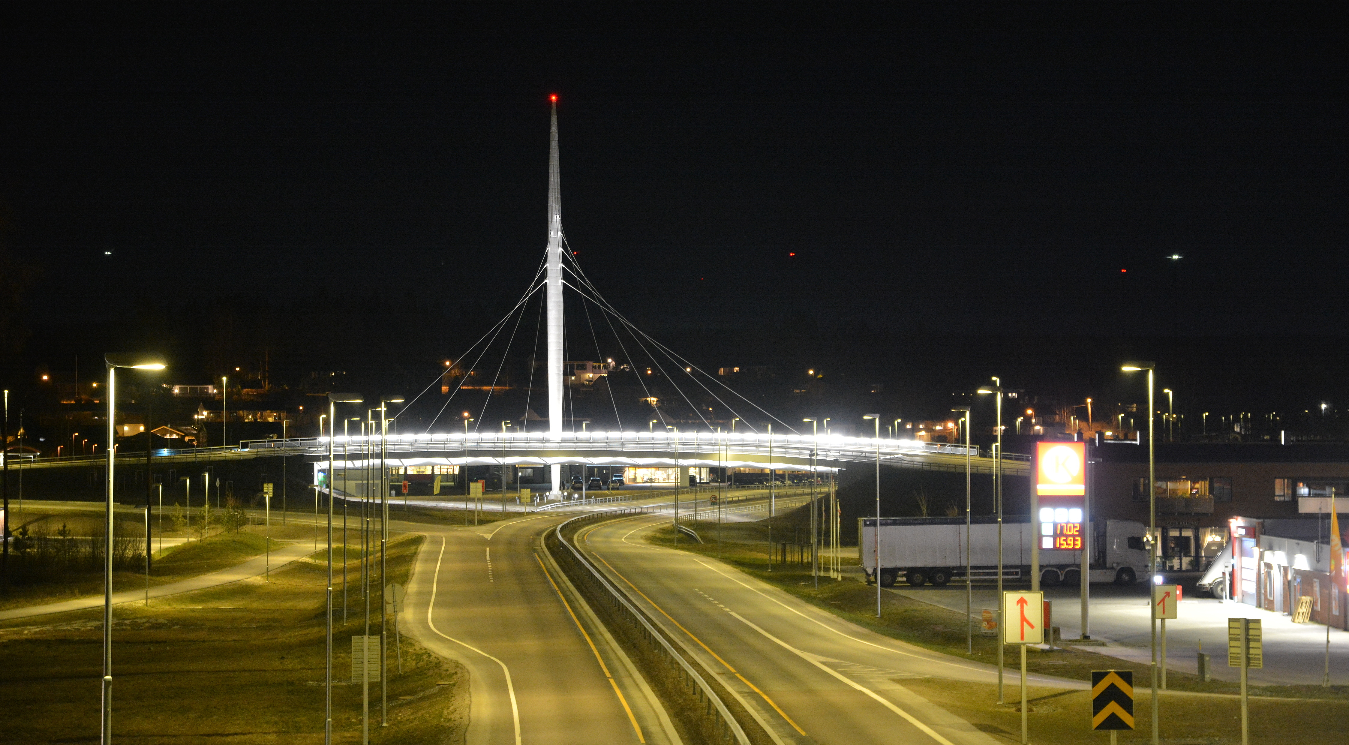 Norgesporten Bru på Ørje - Foto: Glenn Thomas Nilsen